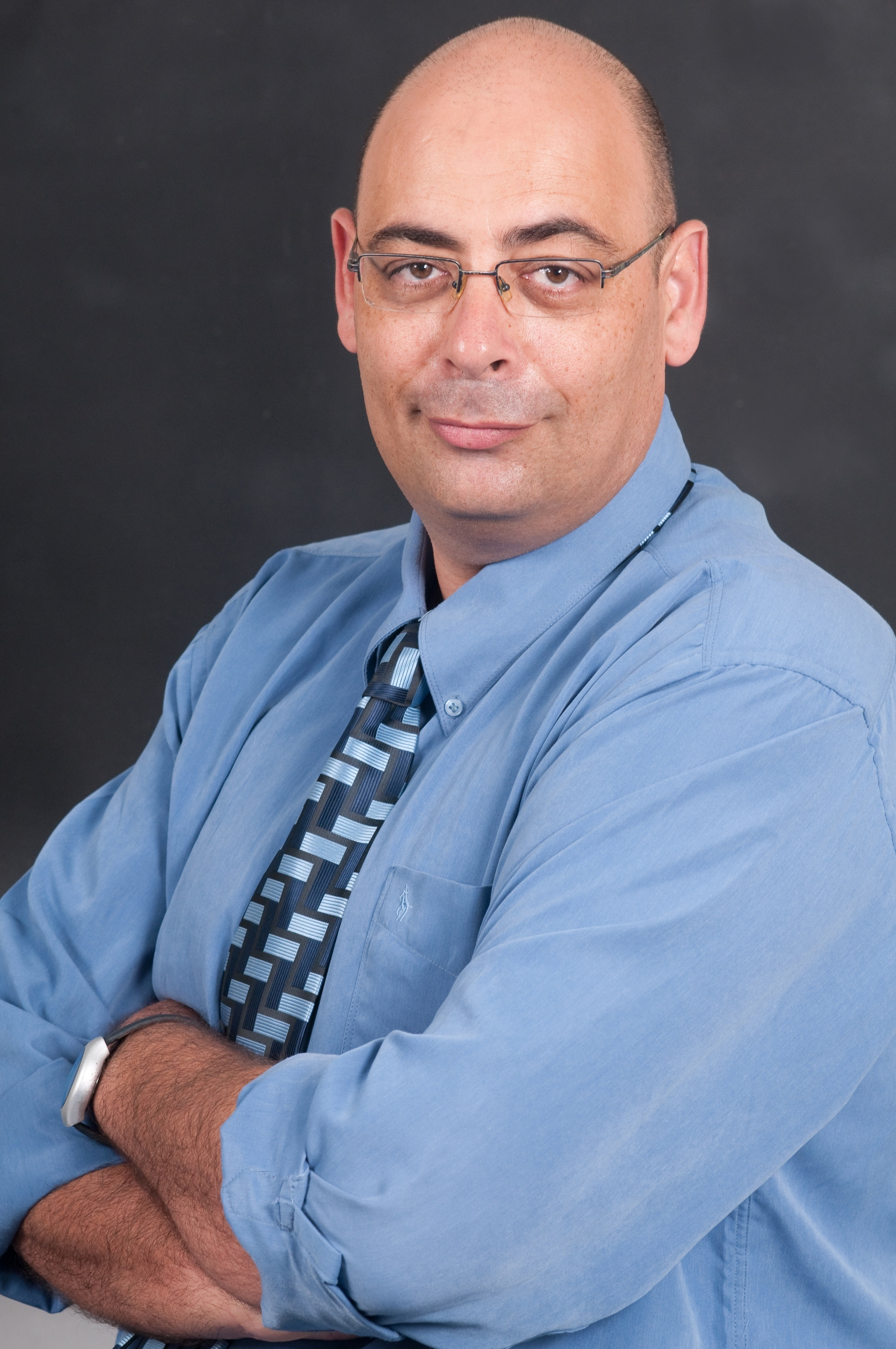 אביב טלמור